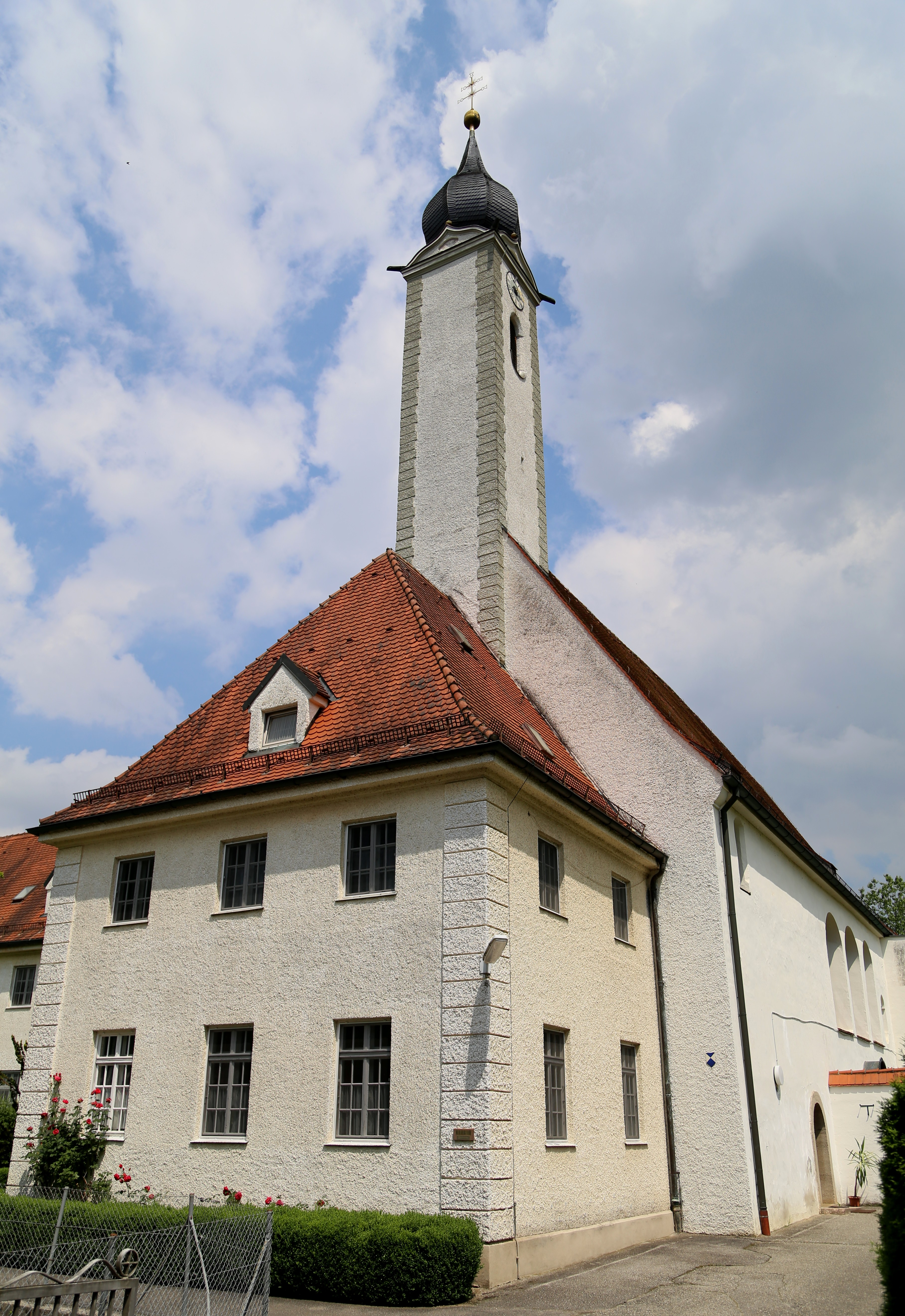 Altenhohenau 10; Dominikanerinnen-Klosterkirche St. Peter und Paul, Saalbau mit eingezogenem Chor und westlichem Dachreiter mit Zwiebelhaube, barocker Neubau um 1670/75 unter Einbeziehung älterer Teile seit 1235, Apsis, Chor und Langhaus- Außenmauern romanisch, Rokoko-Ausbau 1765/74, Turm 1773; mit Ausstattung.